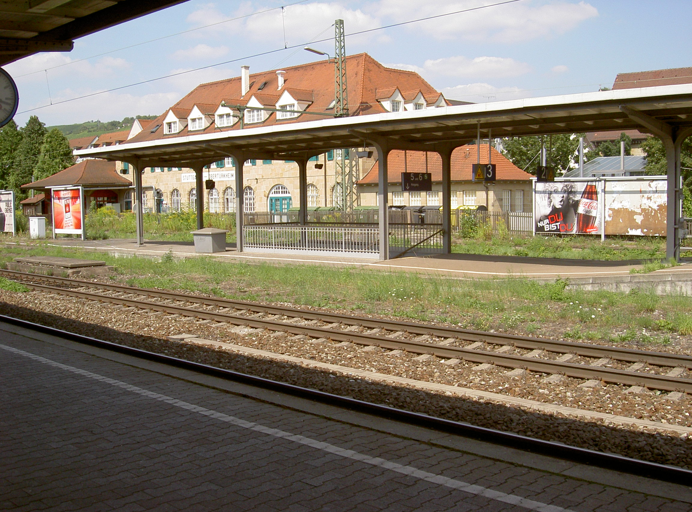 Bahnhof Obertürkheim